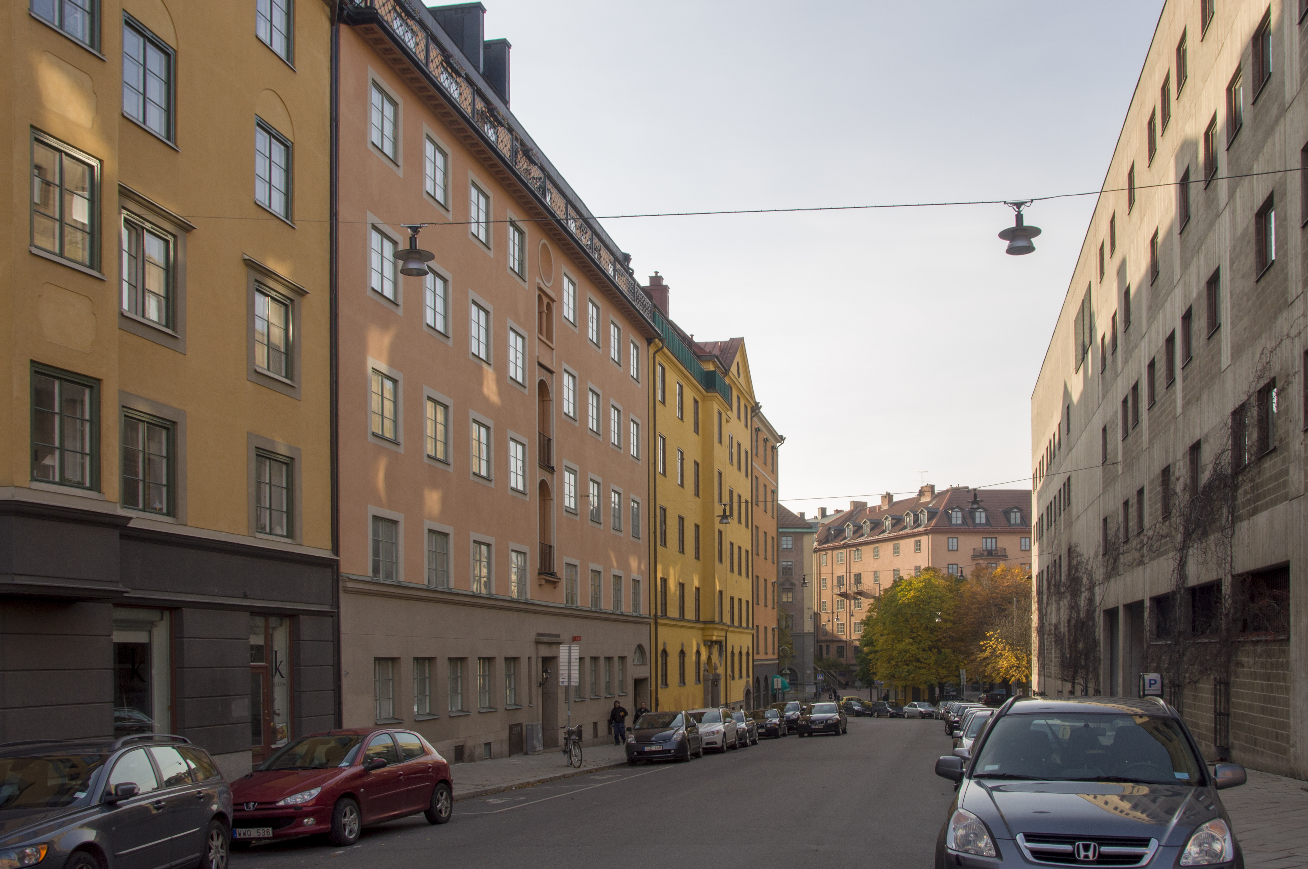 Rådmansgatan från Danderydsplan. Till vänster Rådmansgatan 9. Byggår 1923-24. Arkitekt Ture Sellman.